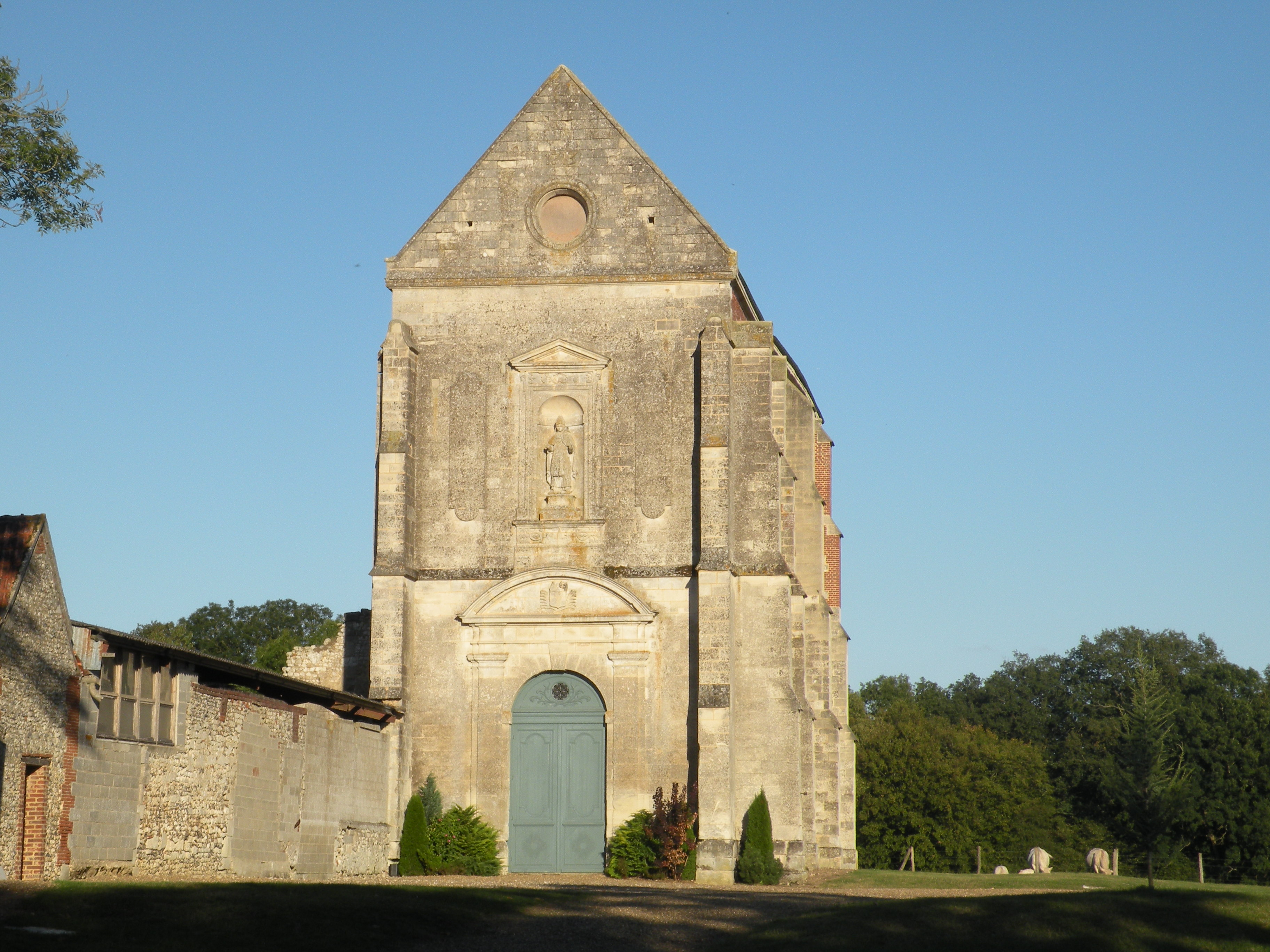 abbaye Saint-Nicolas de Marcheroux